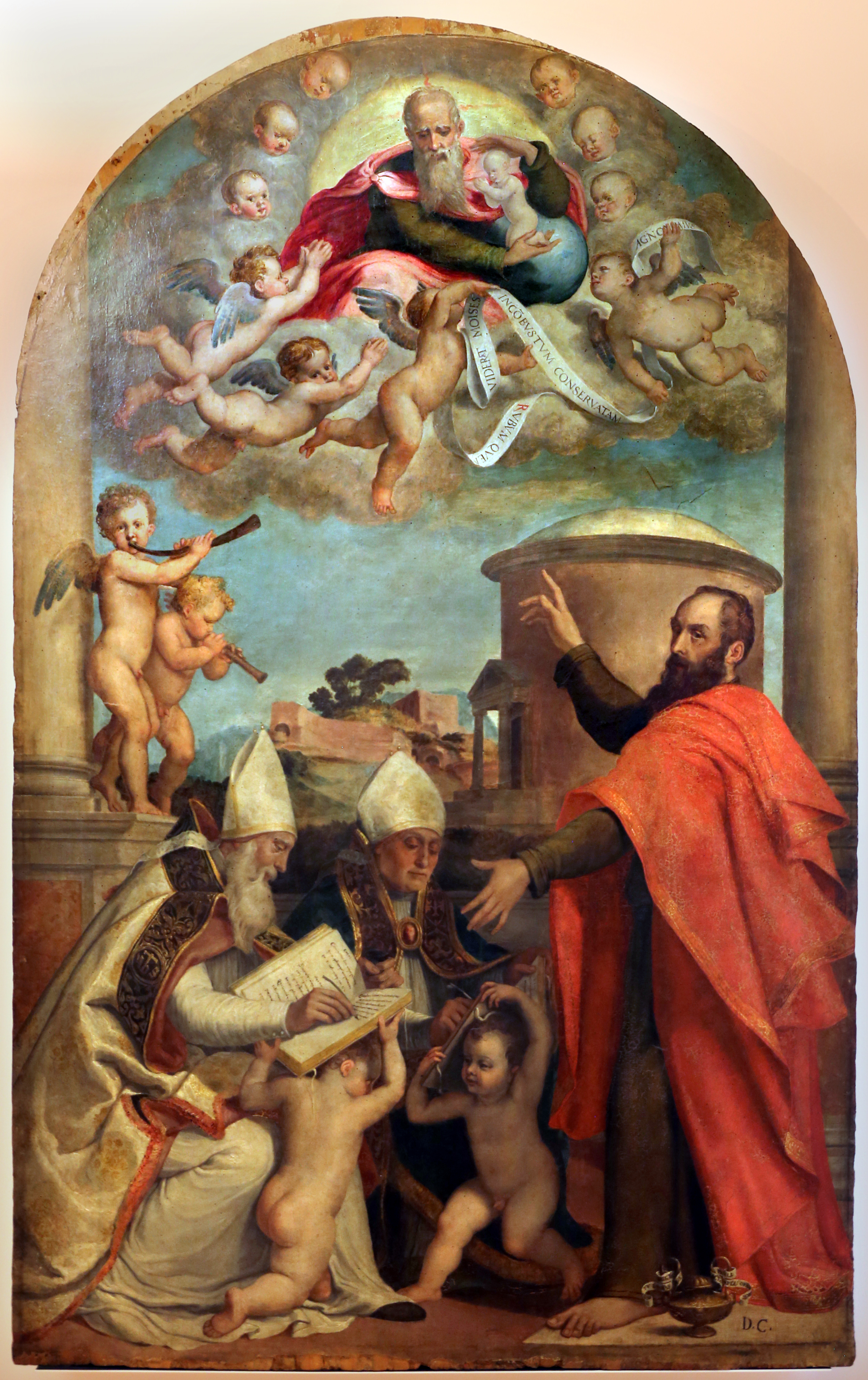 chiesa di San Giacomo Apostolo dei Domenicani This is a photo of a monument which is part of cultural heritage of Italy.